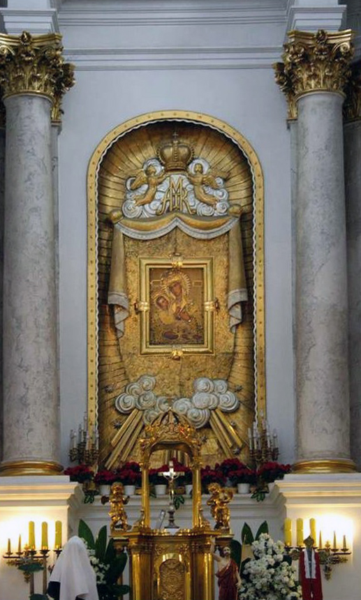 Chełm - Sanktuarium Maryjne na Górze Chełmskiej